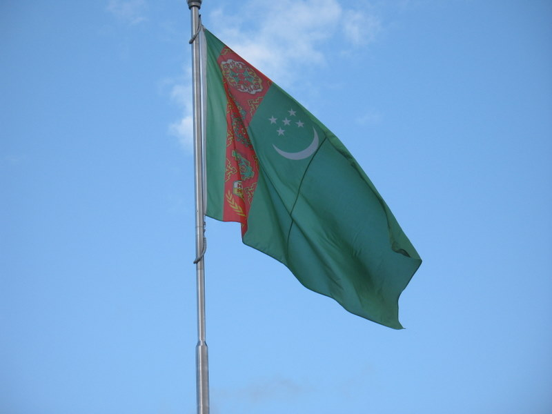 Vlag van Turkmenistan